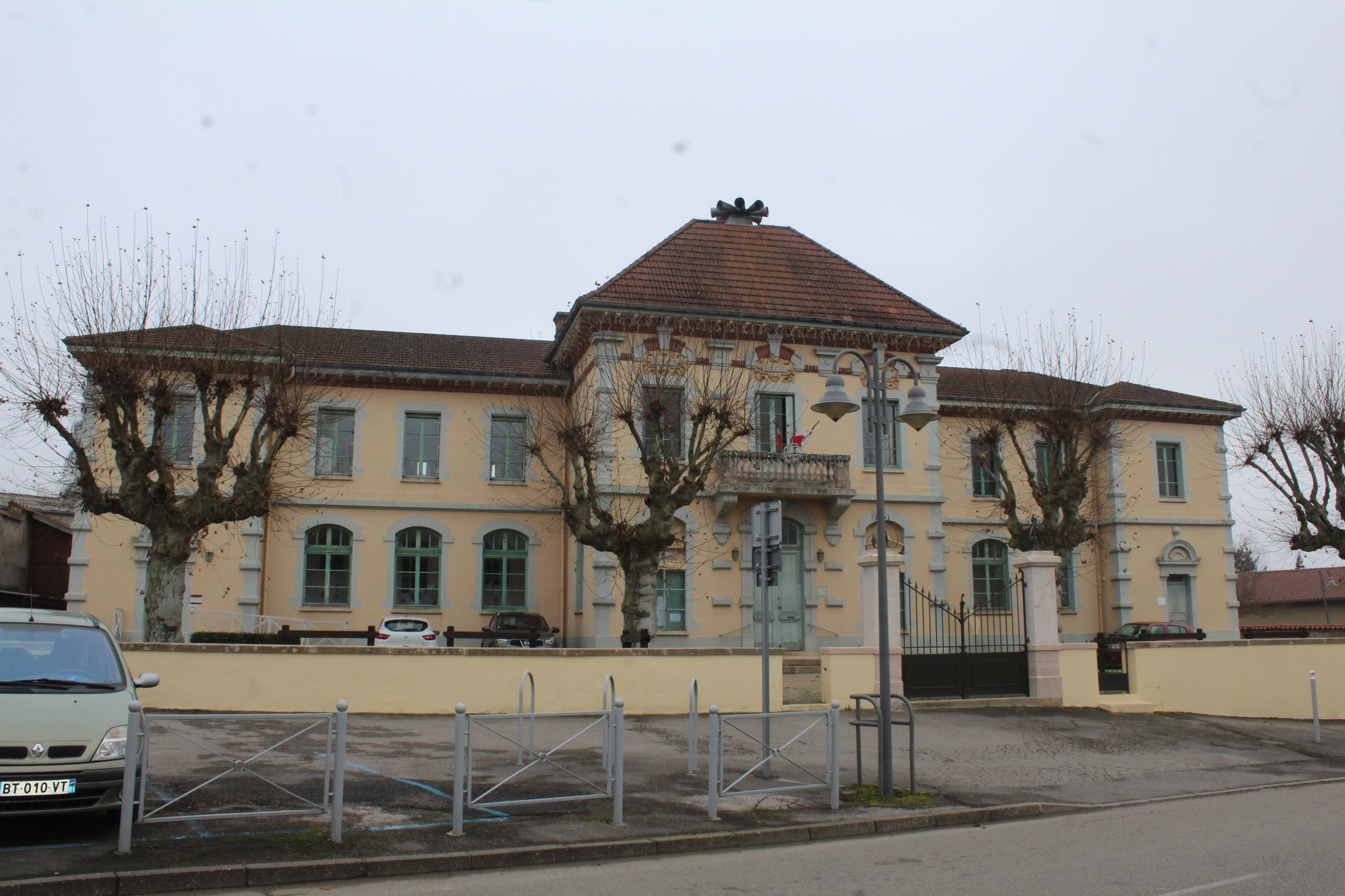 Mairie de Neuville-les-Dames.